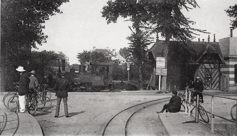 Gare des Chemins de fer du Calvados à Bénouville, à gauche la direction de Caen, à droite vers Ouistreham, la voie au centre vers Cabourg (entrée du pont de Bénouville).